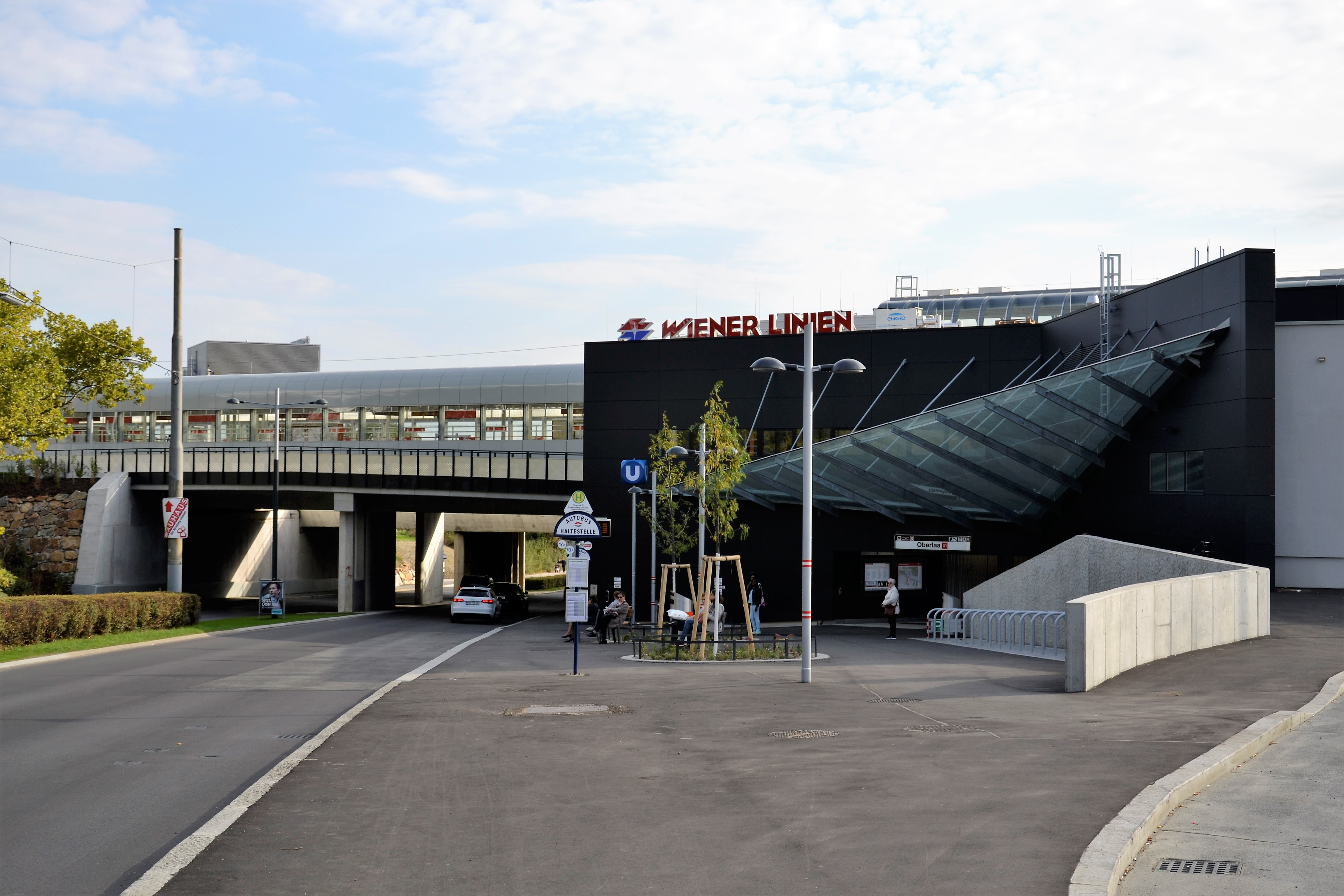 Die U-Bahn-Station Oberlaa ist eine U-Bahn-Station der U-Bahn-Linie U1 in Wien. Auf dieser Aufnahme ist das Aufnahmegebäude Anfang Oktober 2017, knapp einen Monat nach der Eröffnung, zu sehen.